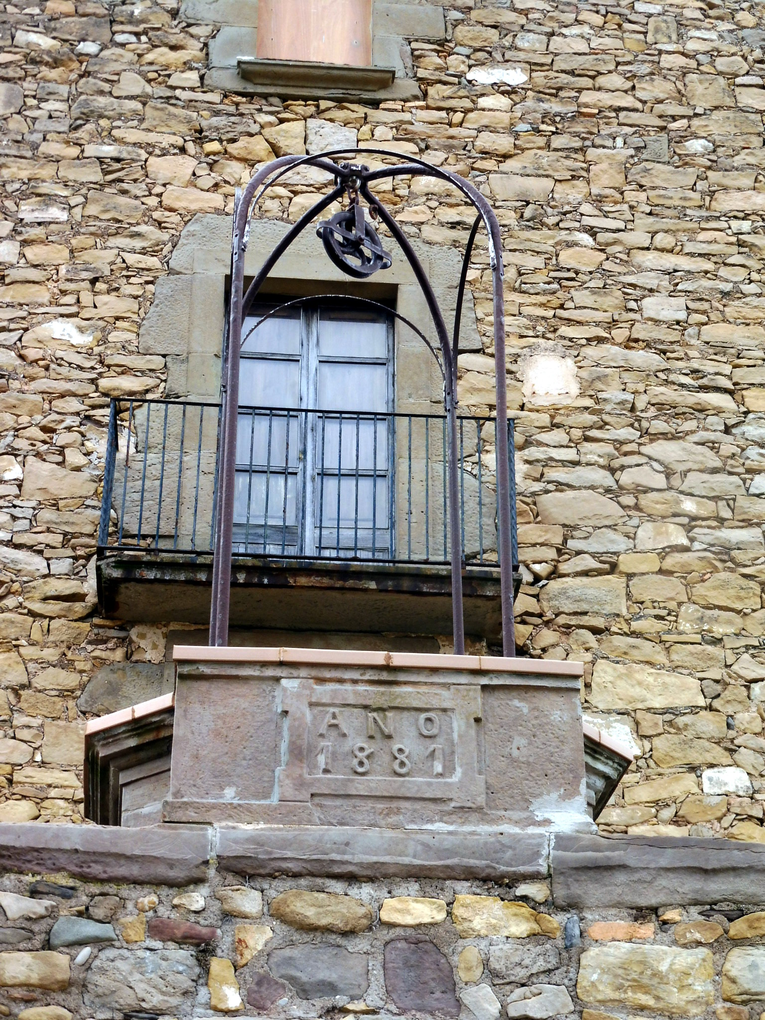 Cal Lledó Nou, al veïnat de Cererols, (Súria): pou a la façana nord